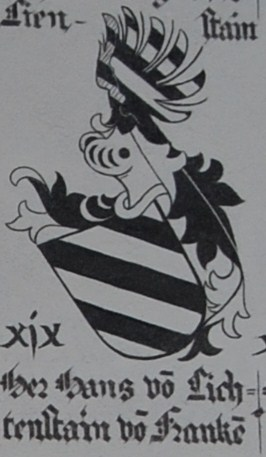 Wappen des Hans von Lichtenstein. Wandgemälde in der Schlachtkapelle Sempach